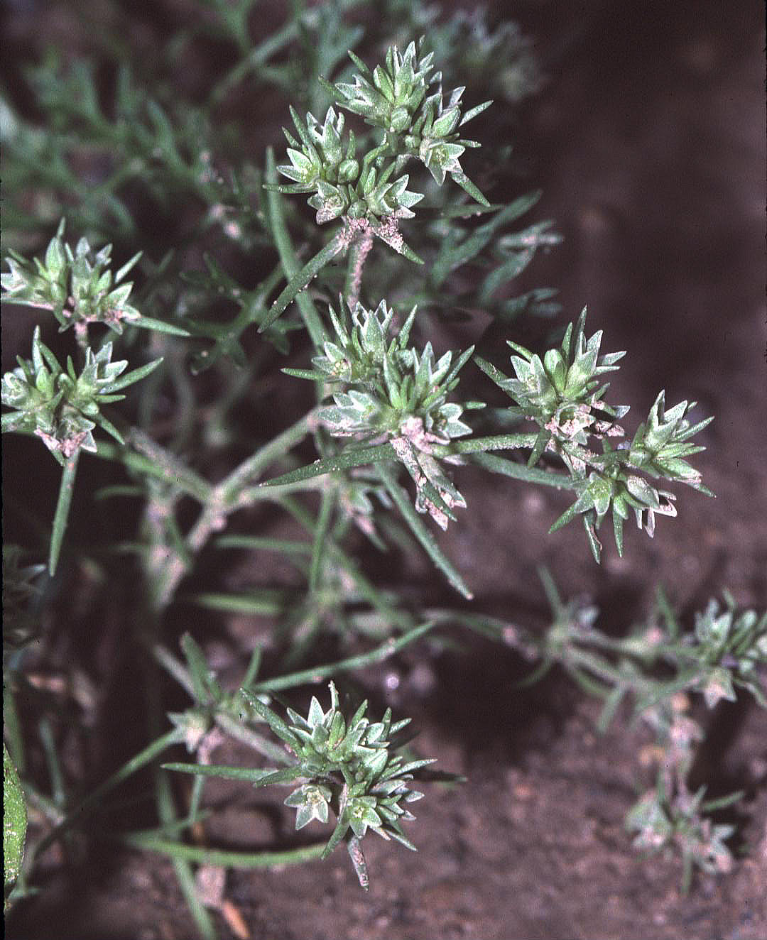 eigenes Foto von 1988, Unterfranken